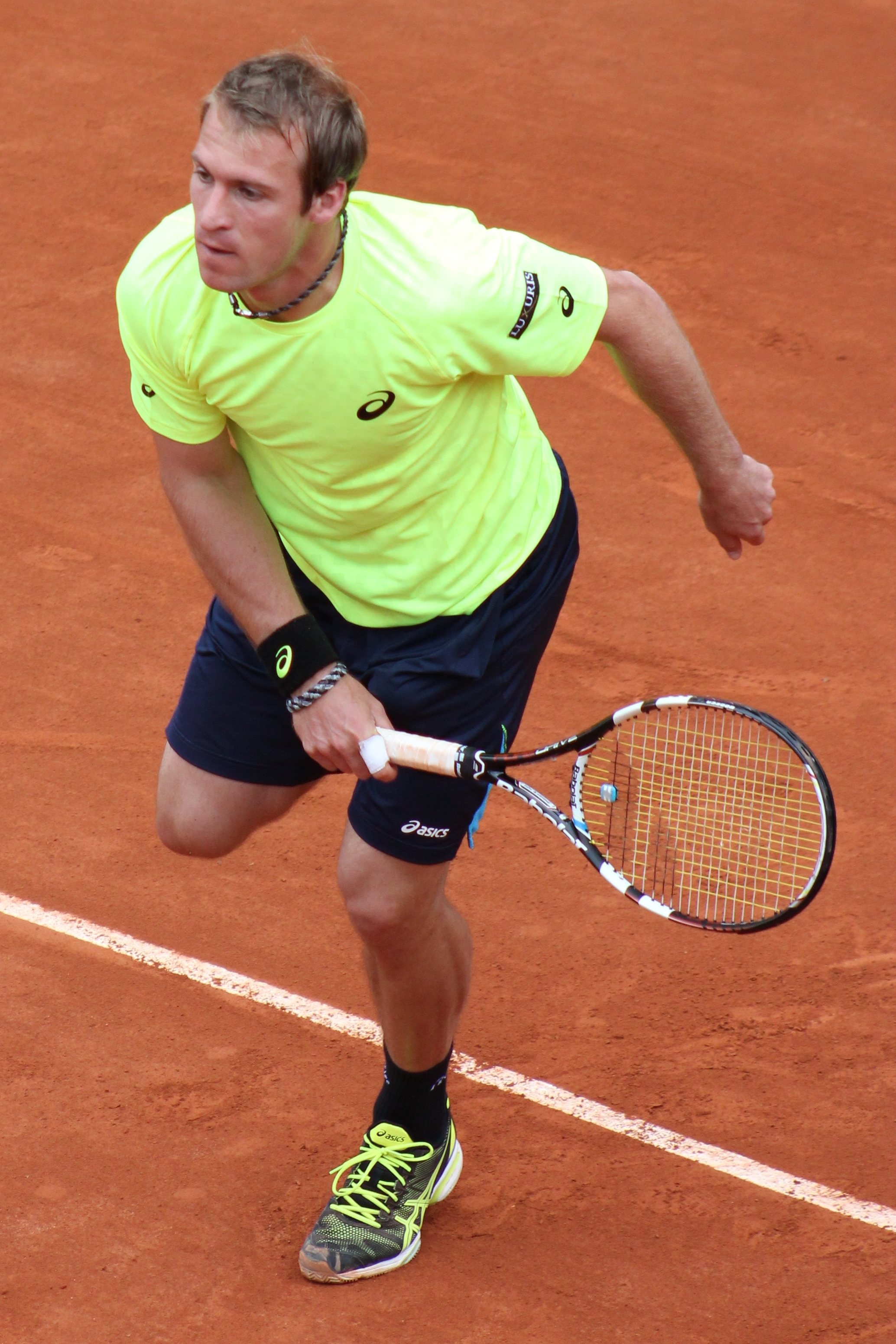 Zemlja RG13 (20)